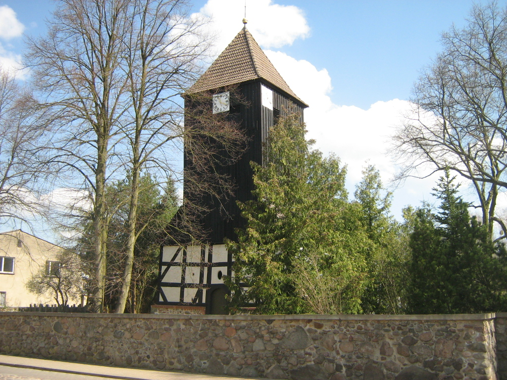 Fachwerkkirche in Bredereiche (heute Gemeindeteil der Stadt Fürstenberg (Landkreis Oberhavel, Brandenburg). Sie wurde im Jahre 1689 auf den Fundamenten eines Vorgängerbaues errichtet.